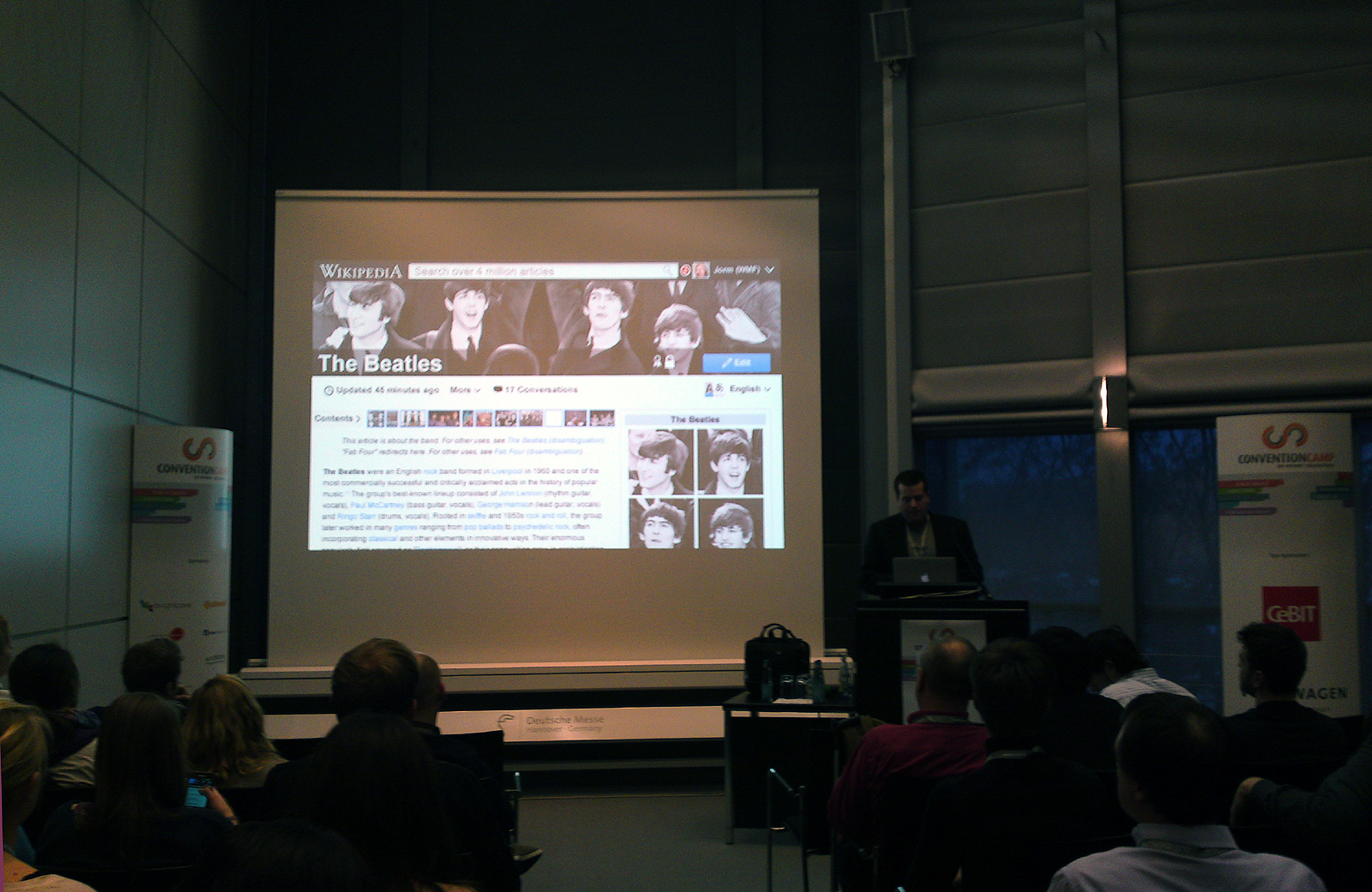 Markus Franz, Geschäftsführender Gesellschafter von Sucomo Consulting, ist mit seinem Team ganz auf Wikis und die Wikipedia spezialisiert. 2012 hielt er auf dem ConventionCamp auf dem Messegelände in Hannover einen Vortrag über die Funktionsweise der Wikipedien und stellte die Frage nach der Wikipedia im Jahr 2015 ...